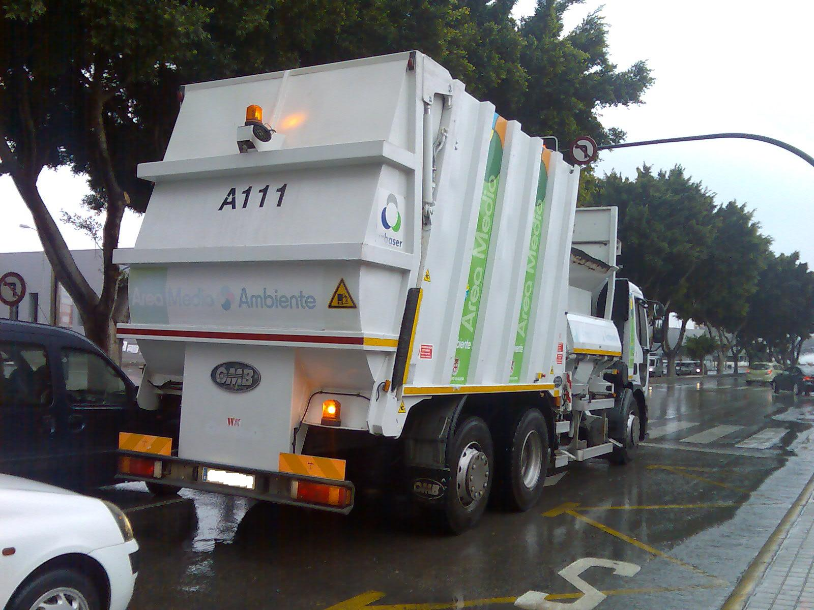 Un camión de la basura en Almería. A rubbish lorry seen in Almería.